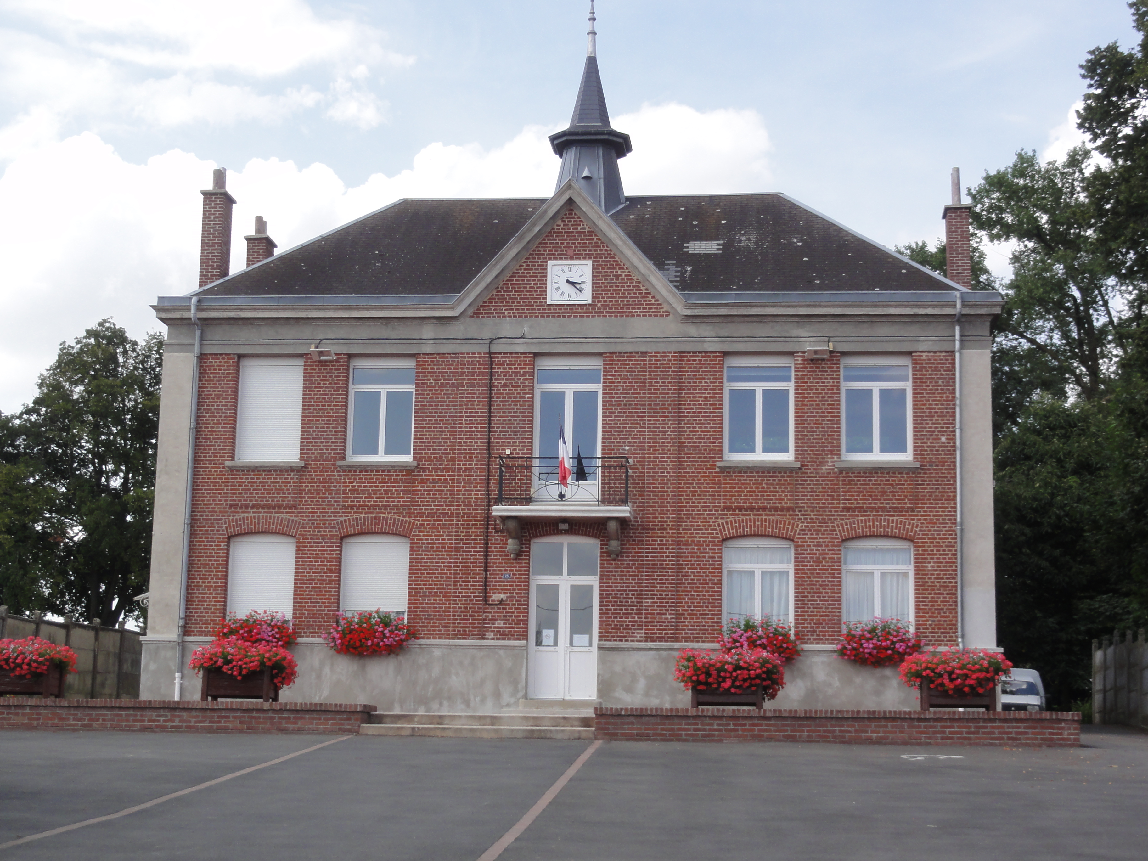 Lempire (Aisne) mairie